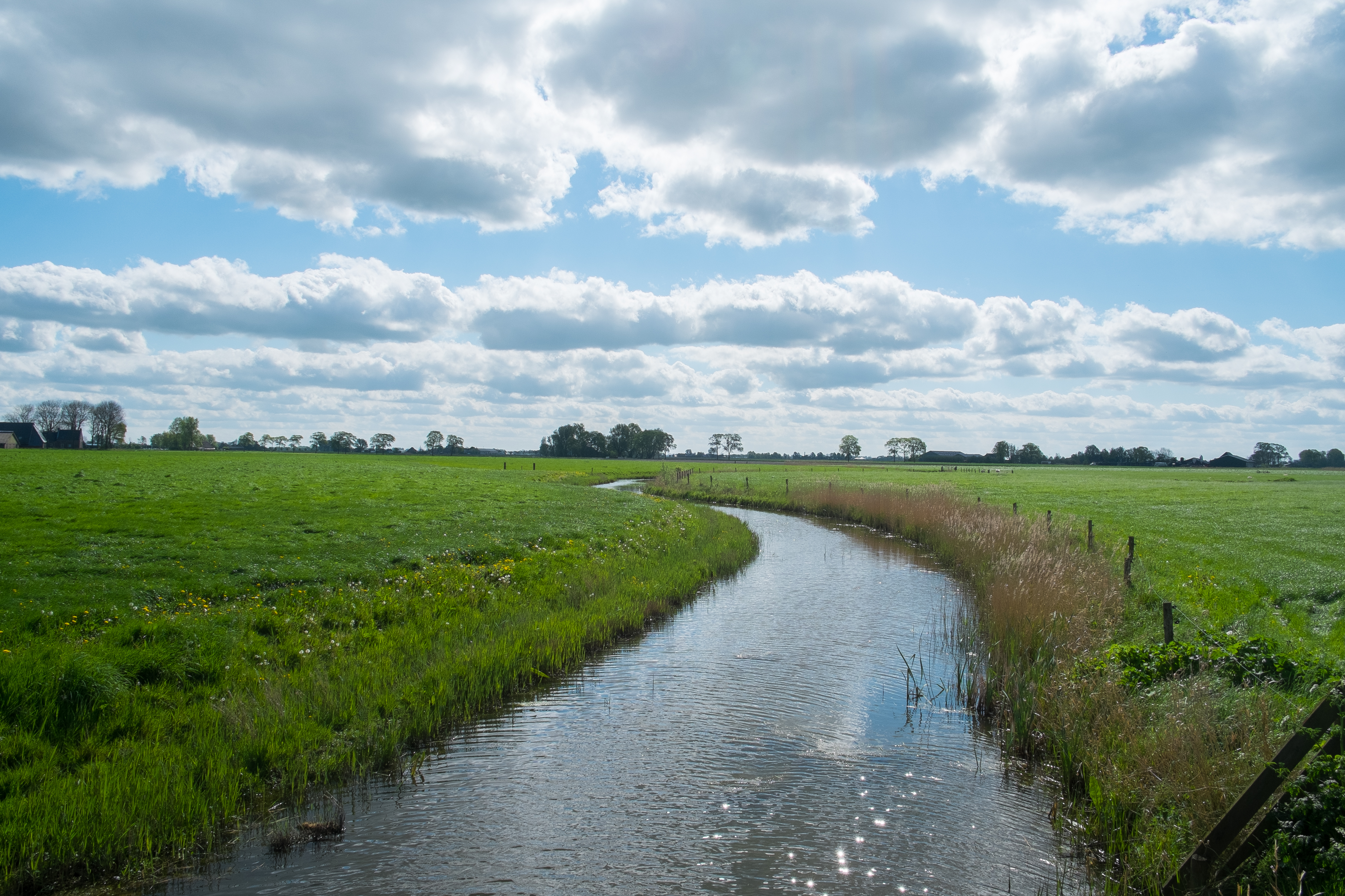 Keegensterried (Keegenster Ried) vanaf het Keegensterpad (richting zuidoosten)